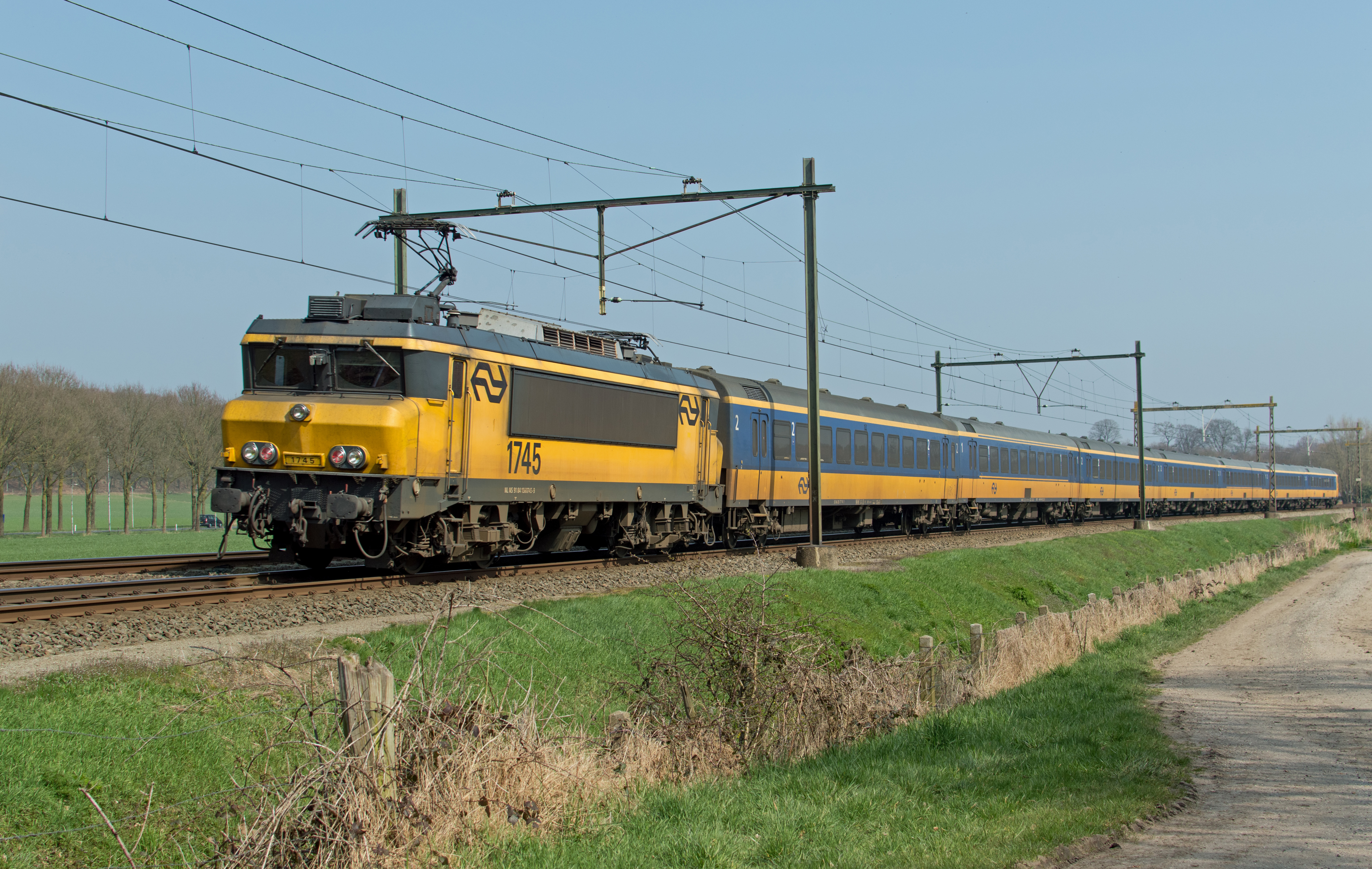 Net buiten Velp in de richting van Rheden. NS 1745 duwt IC 3642 naar Zwolle op donderdag 9 april. Eén van de laatste officiële inzetten van de ICRm stammen op dit traject. Met ingang van vandaag 13-04-2015 zijn ze verdwenen in de dienst. Update: 15 april 2015, zijn de 1700 met ICRm stammen "Niet Inzetbaar" verklaard en dus compleet uit dienst gehaald.